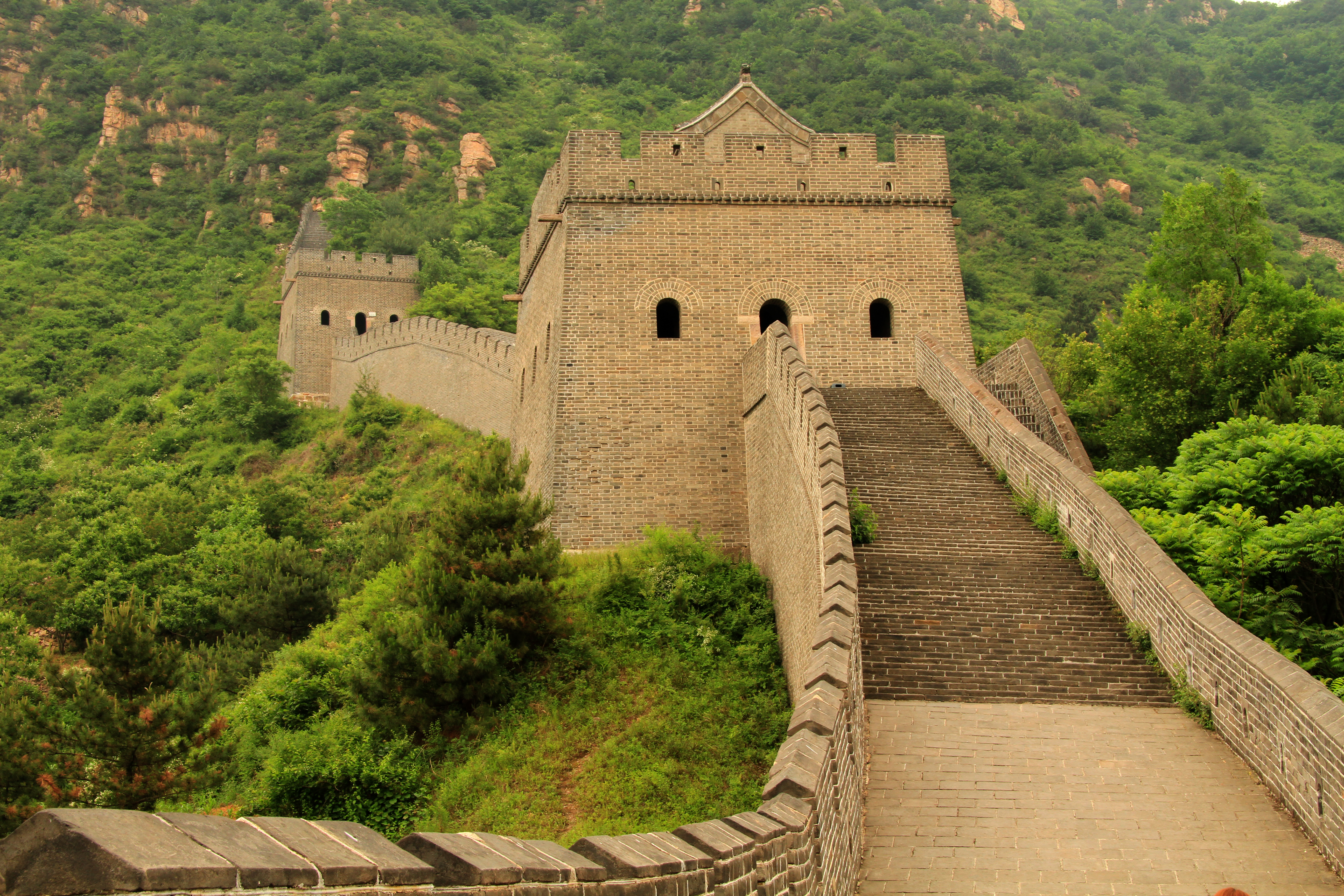 Taipingzhai to Huangyaguan 04